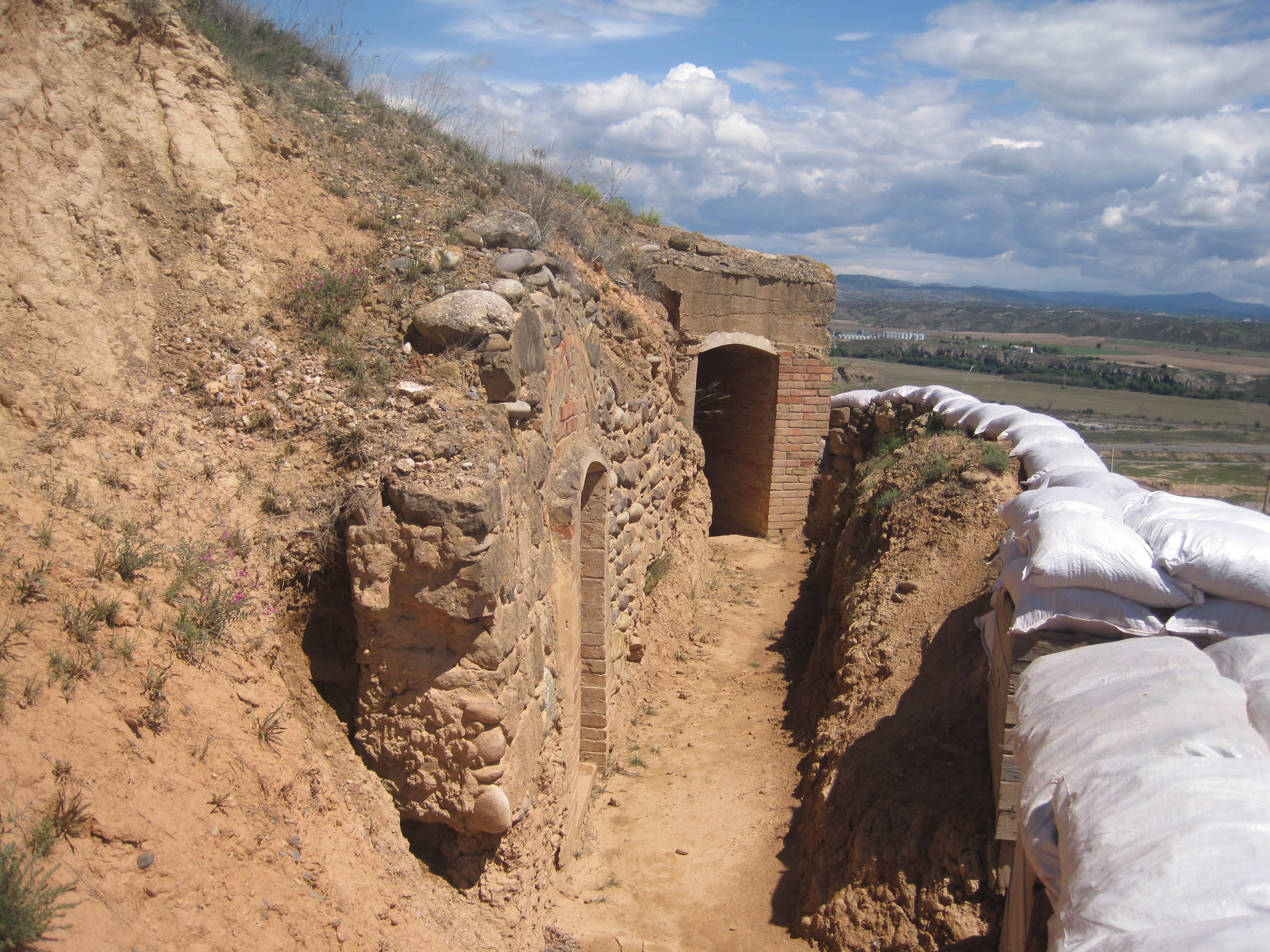 Aragonés: Mugas d'a Guerra Civil en Castillón d'o Puent, Semontano de Balbastro, Aragón.